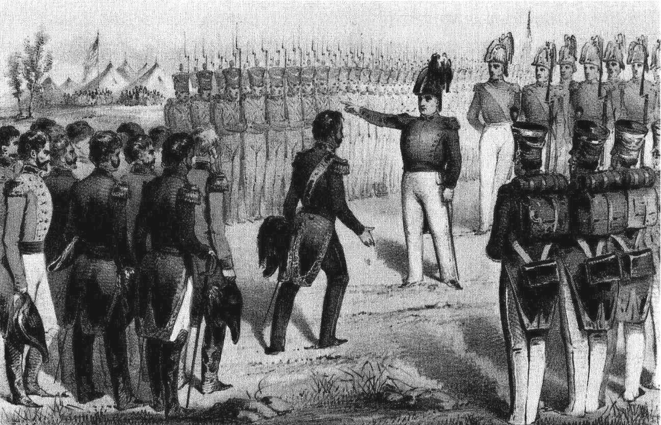 General Pedro de Ampudia verhandelt mit Zachary Taylor nach der Schlacht von Monterrey über die Übergabe der Stadt